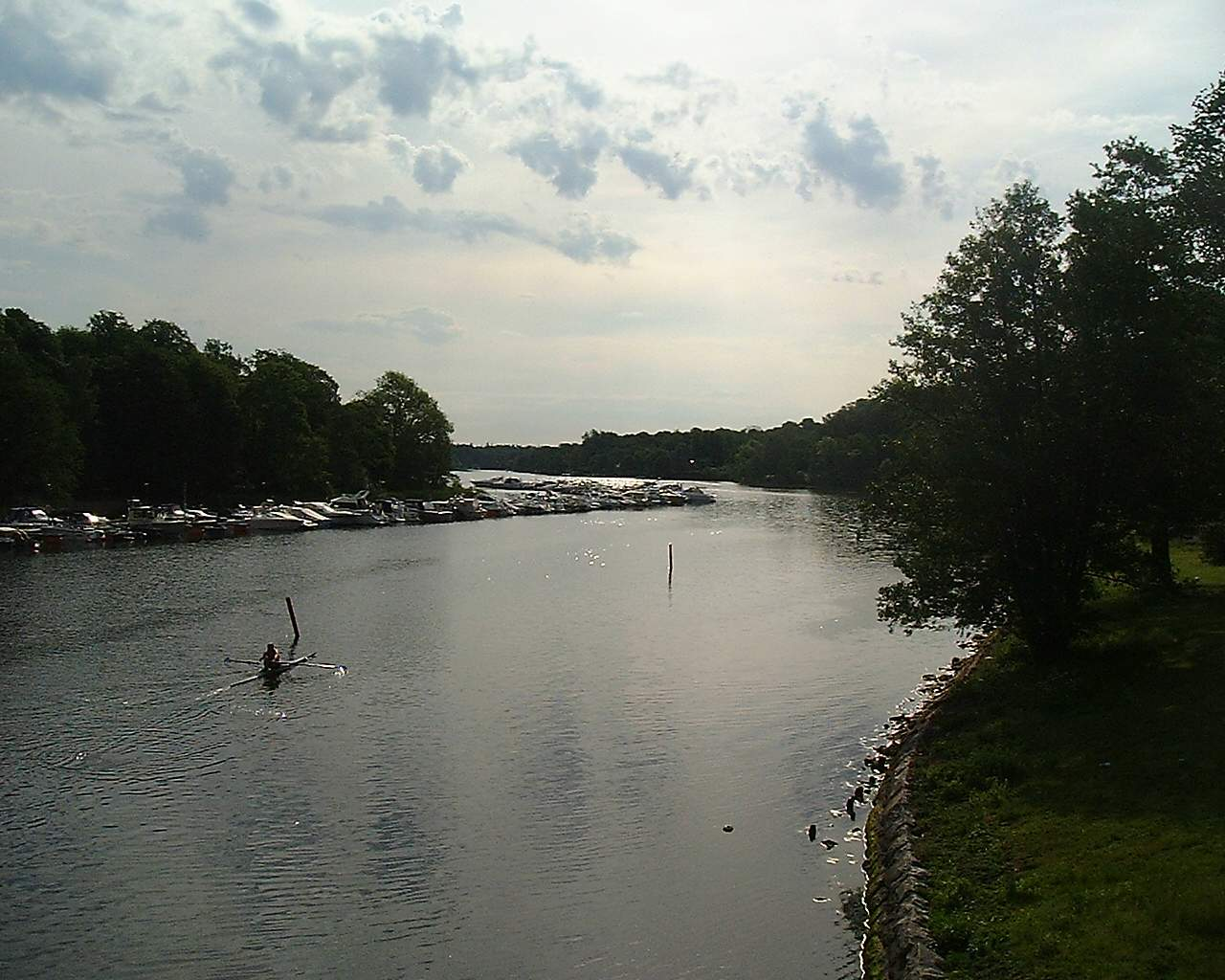 Djurgårdsbrunnsviken viewed from Djurgårdsbron. Stockholm, Sweden